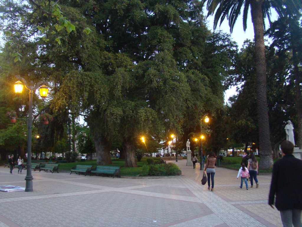 Vista de la plaza de armas.